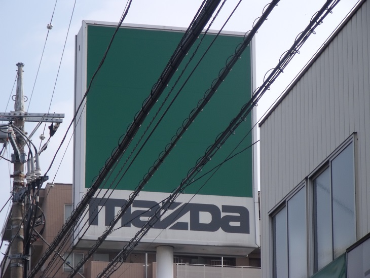 本人が埼玉県内で撮影